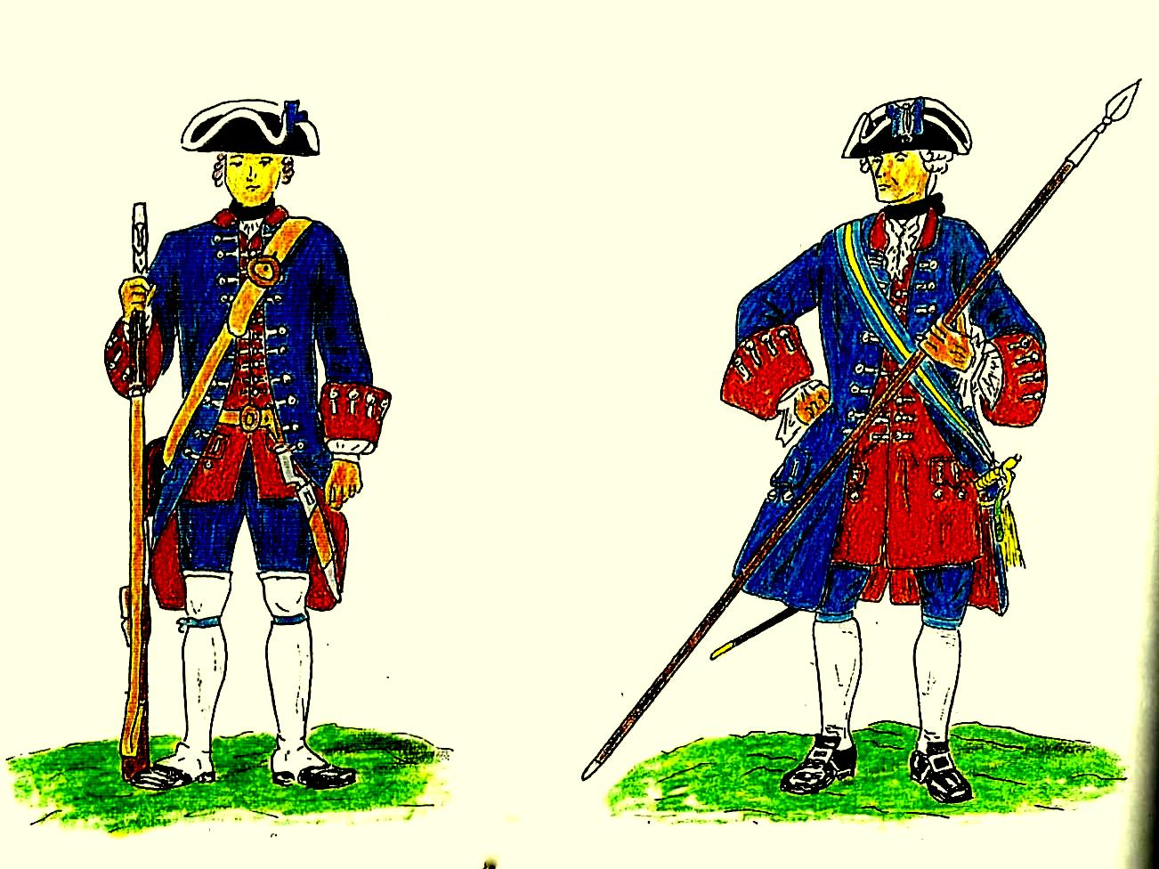 Uniform im Regiment Keller in Sardinien-Piemont, links Füsilier, rechts Offizier